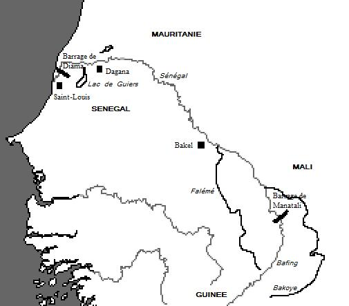 Bassin du fleuve Sénégal